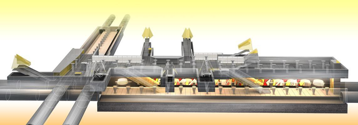 Wielobranżowy Projekt Koncepcyjny centralnego odcinka II lini metra w Warszawie